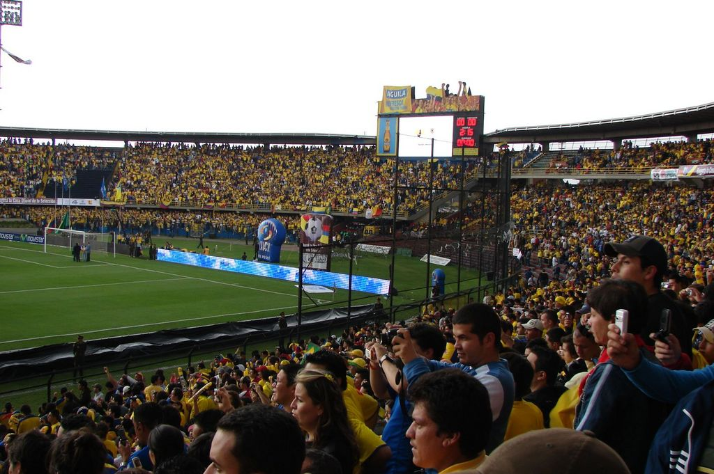 El campin